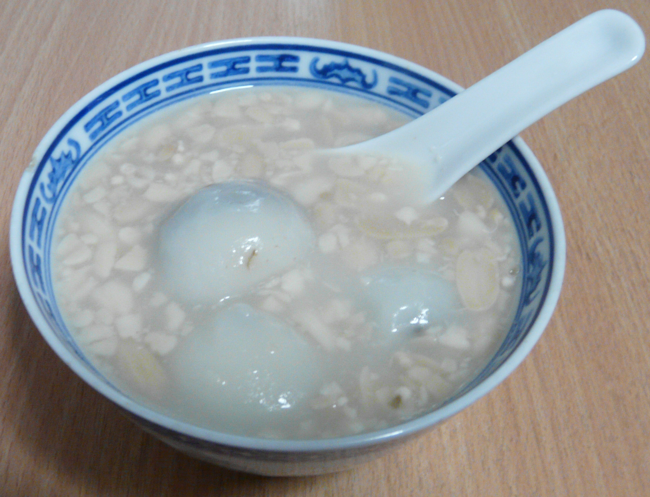 ah balling